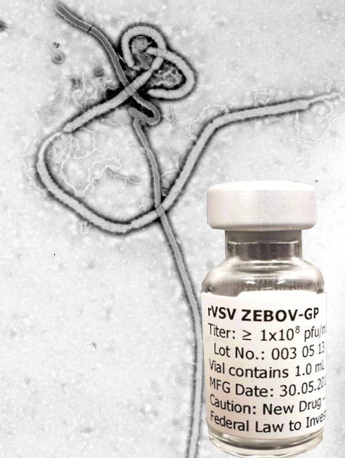 rVSV-ZEBOV - Ébola virus